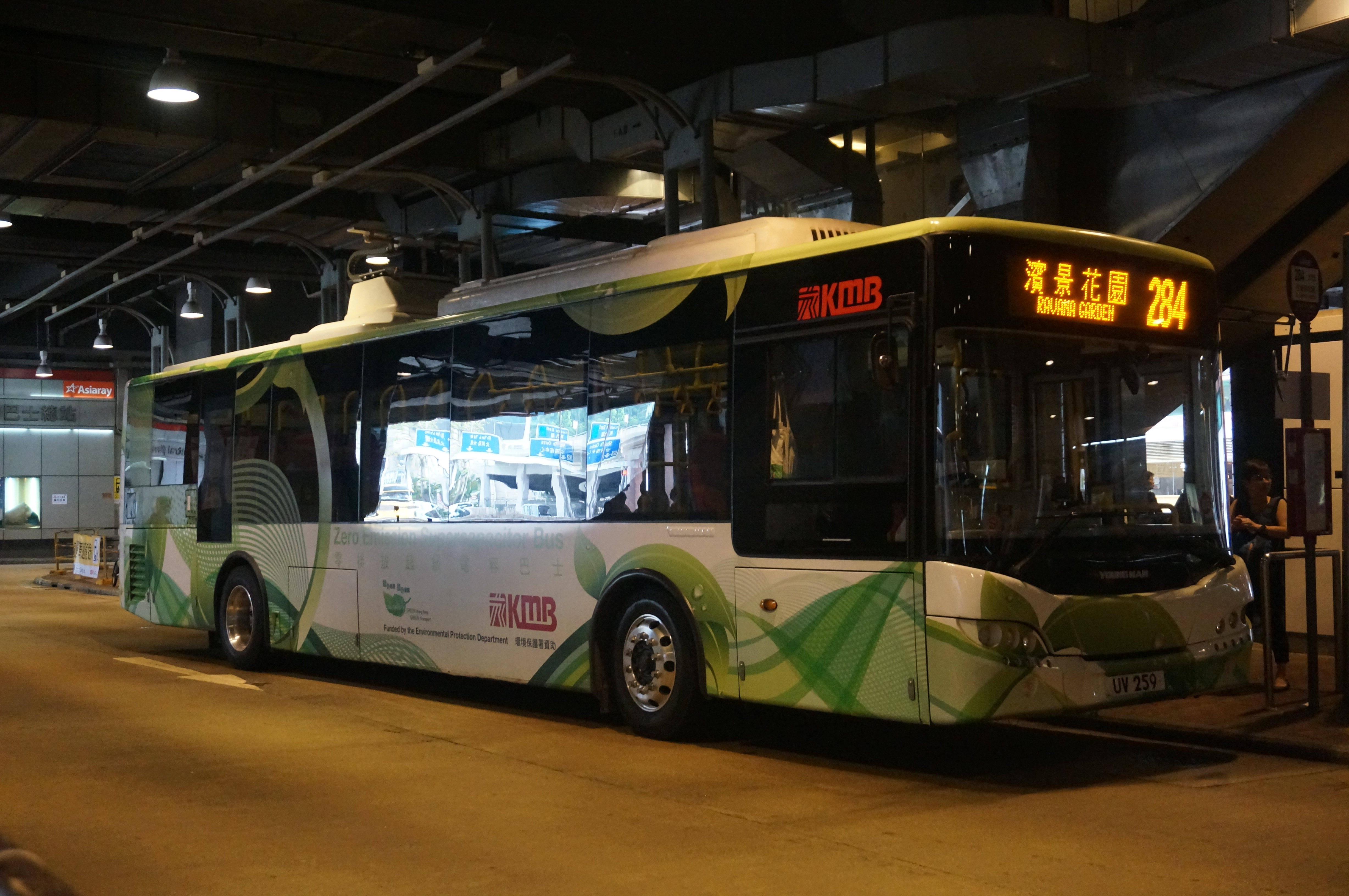 （UV259/AYM4）行走九龍巴士284線